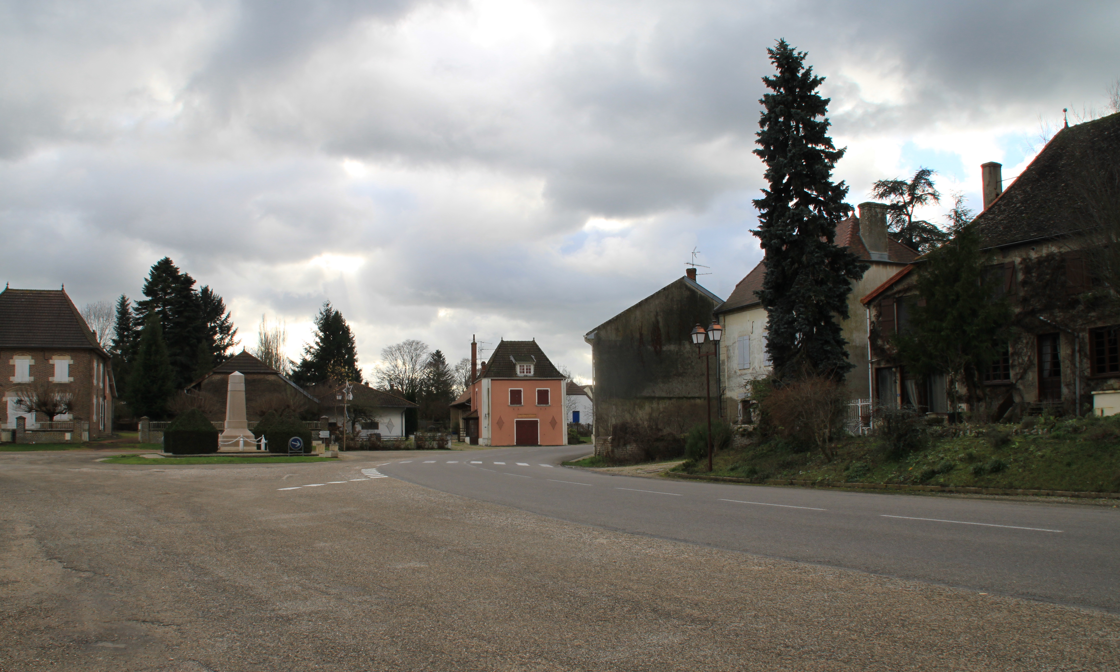 La Chapelle-Saint-Sauveur (Saône-et-Loire) Ortskern